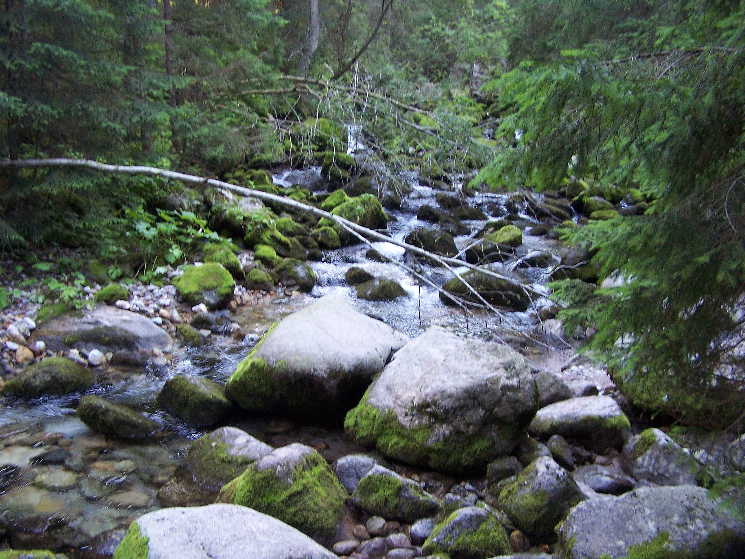 Kasprowy Potok